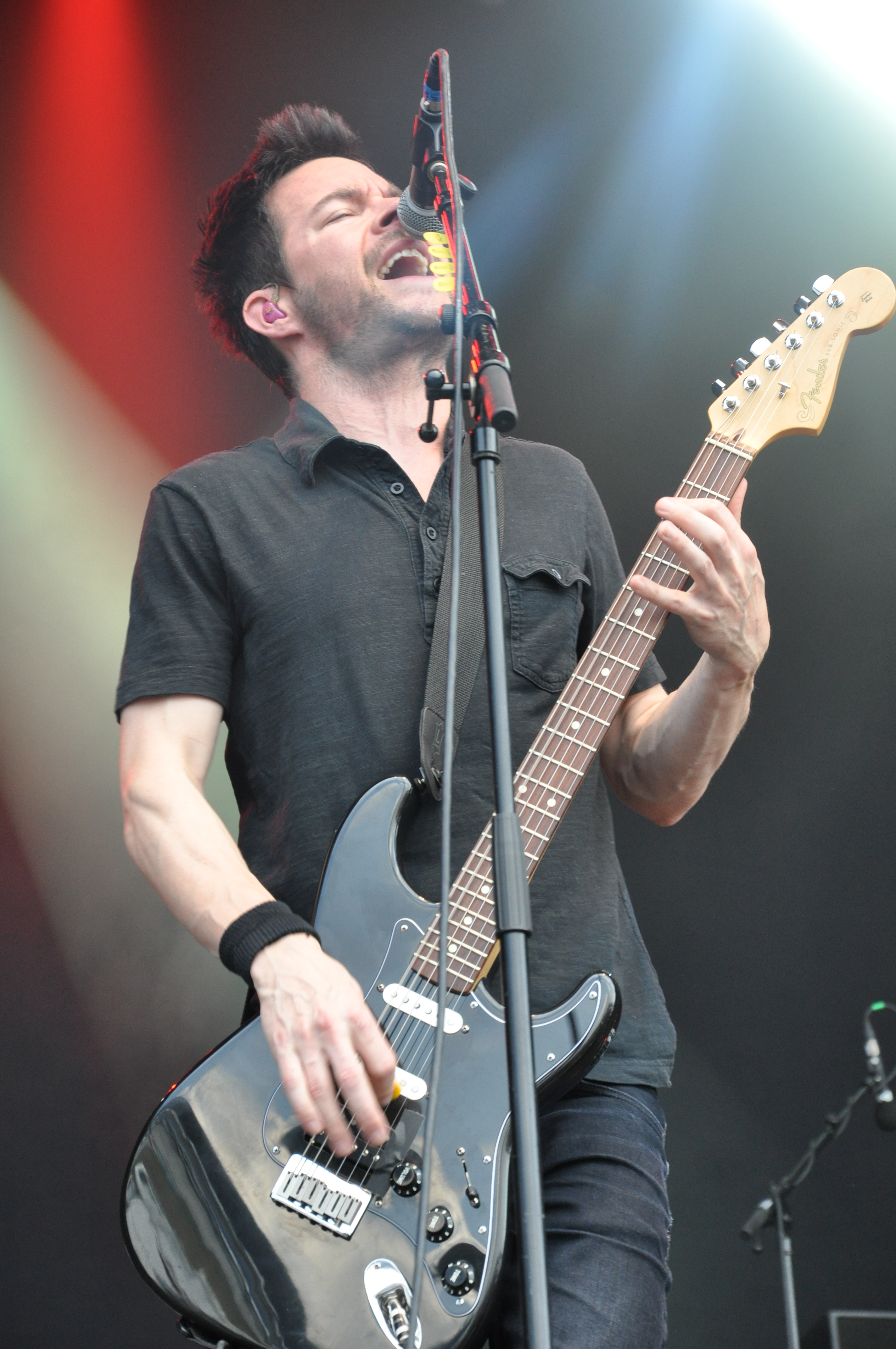 Chevelle bei Rock am Ring 2014